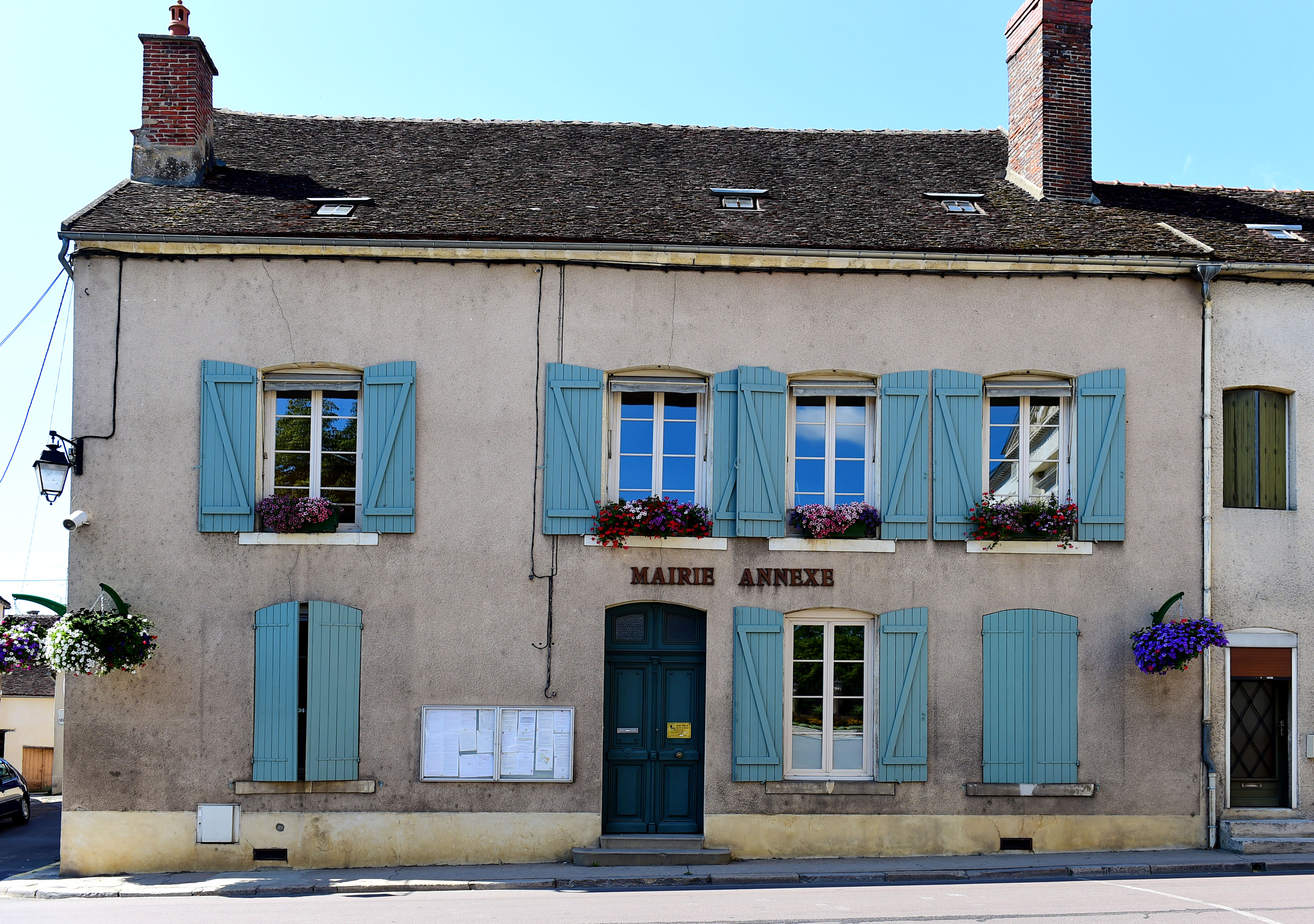 Mairie de Brienon-Sur-Armançon